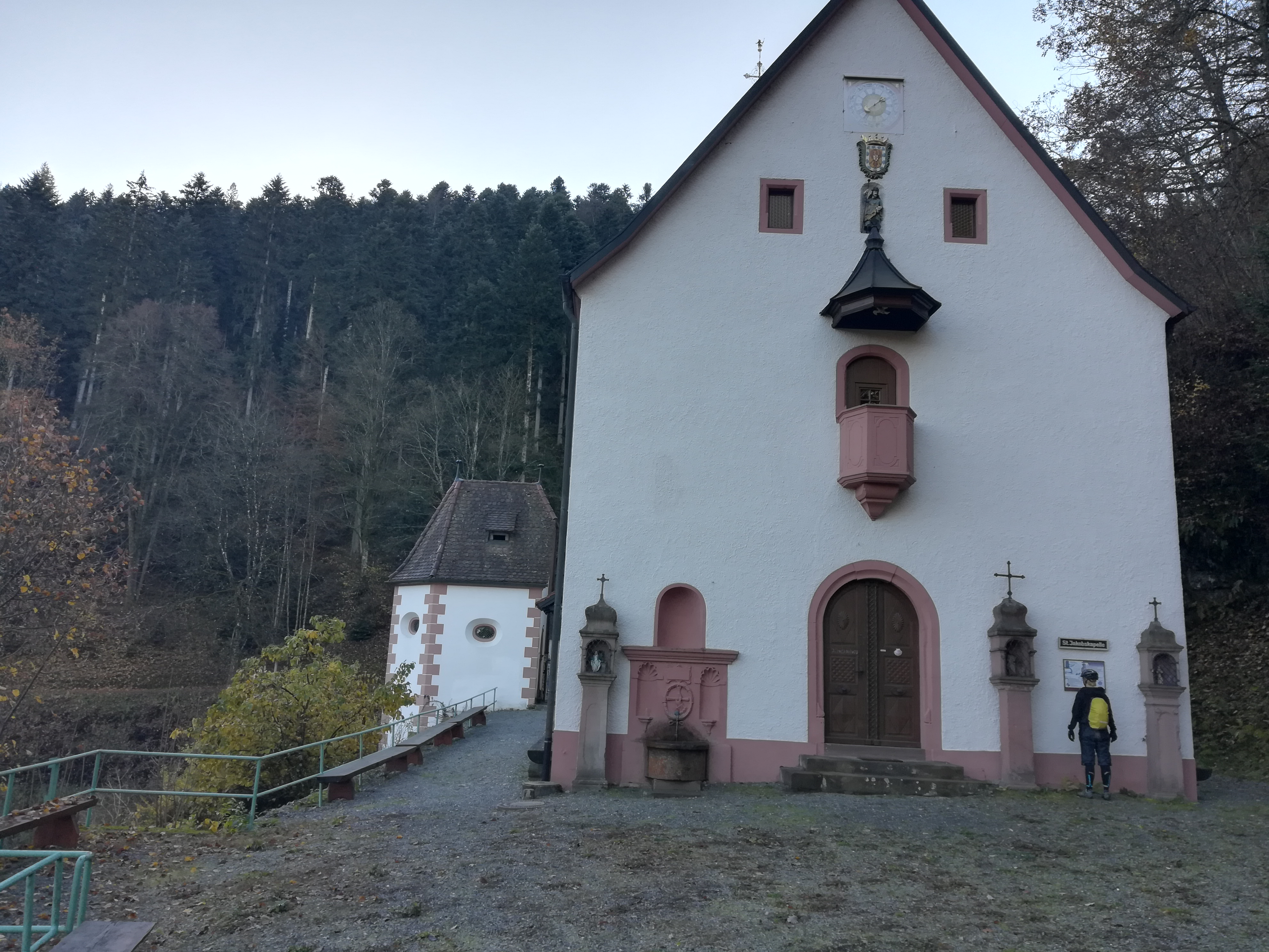 Jakobusweg an der Jakobuskapelle (Wolfach)